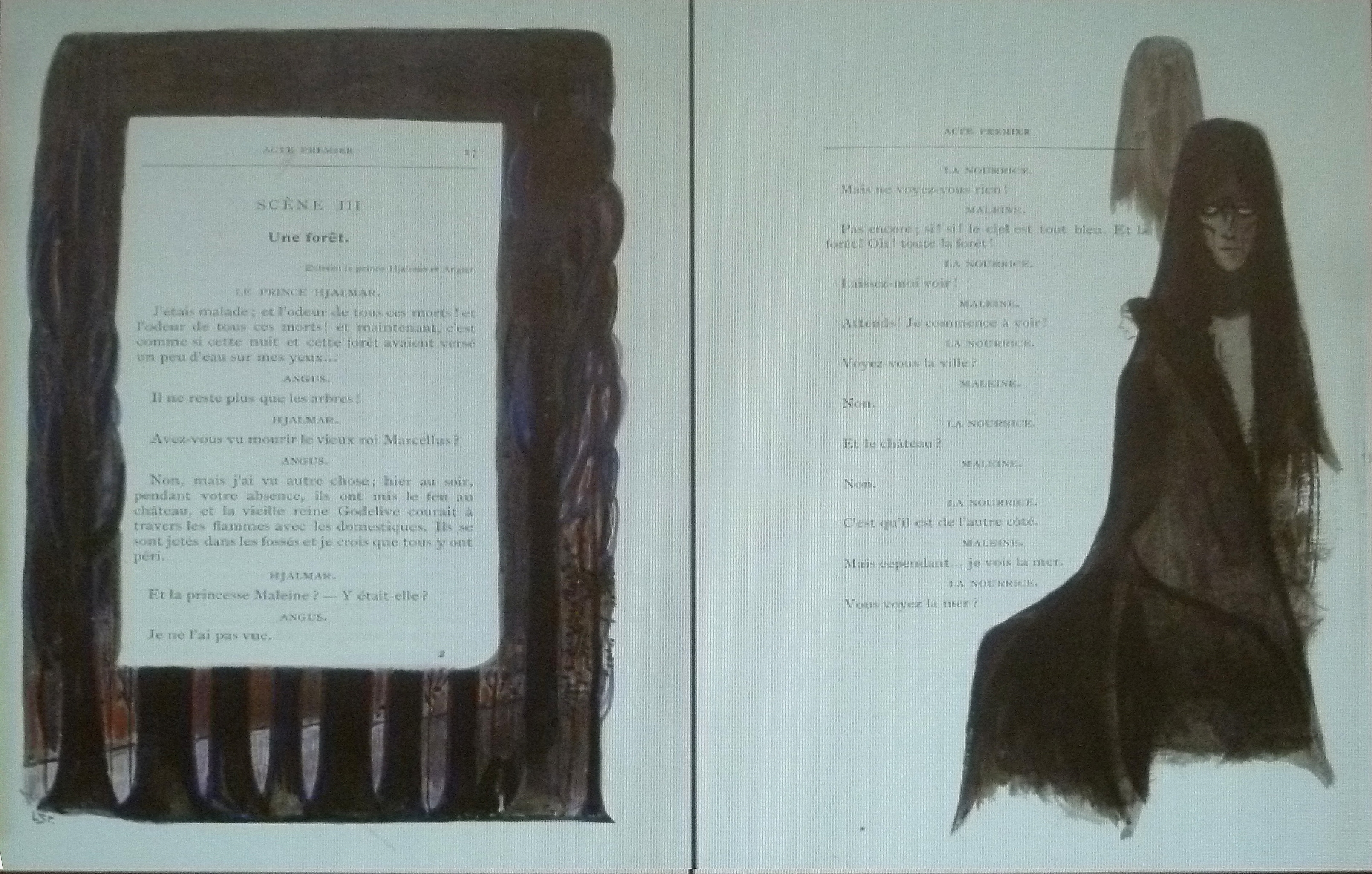 "La Princesse Maleine" (1889), pièce de théâtre par Maurice Maeterlinck; illustrations par Léon Spilliaert (1903); collection privée